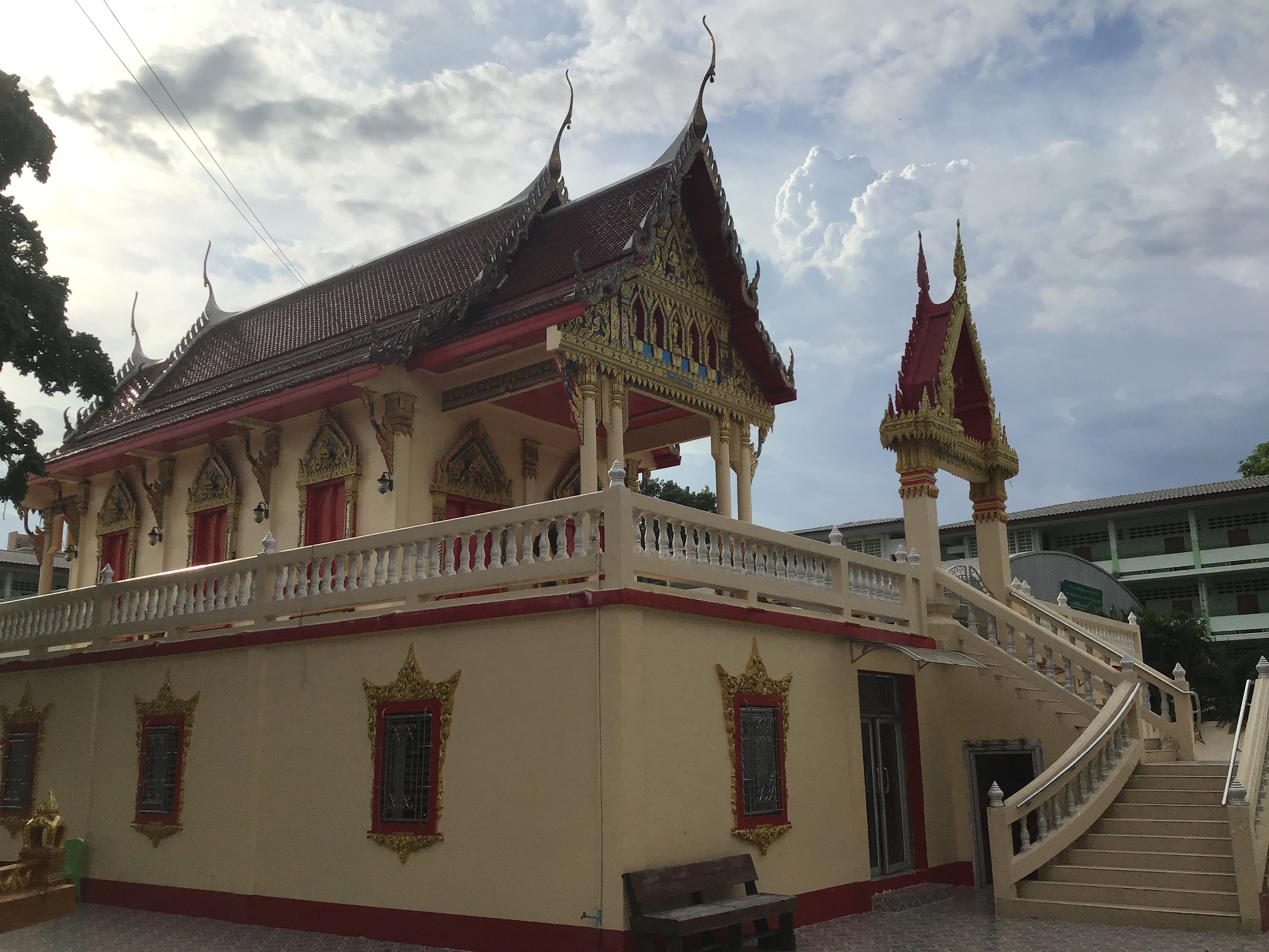 อุโบสถ